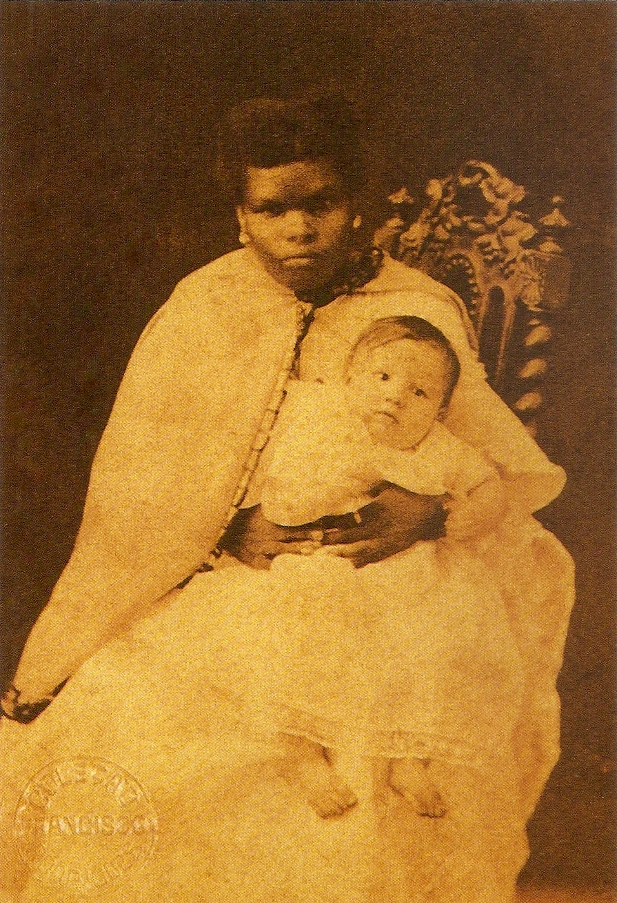 Ama-de-Leite com Fernando Simões Barbosa - Pernambuco, 1860. Carte de visite, 10 x 6 cm. Produzido pelo estúdio Photographia Artística de Eugênio & Maurício. Acervo do Museu do Homem do Nordeste - Recife, PE, Brasil.